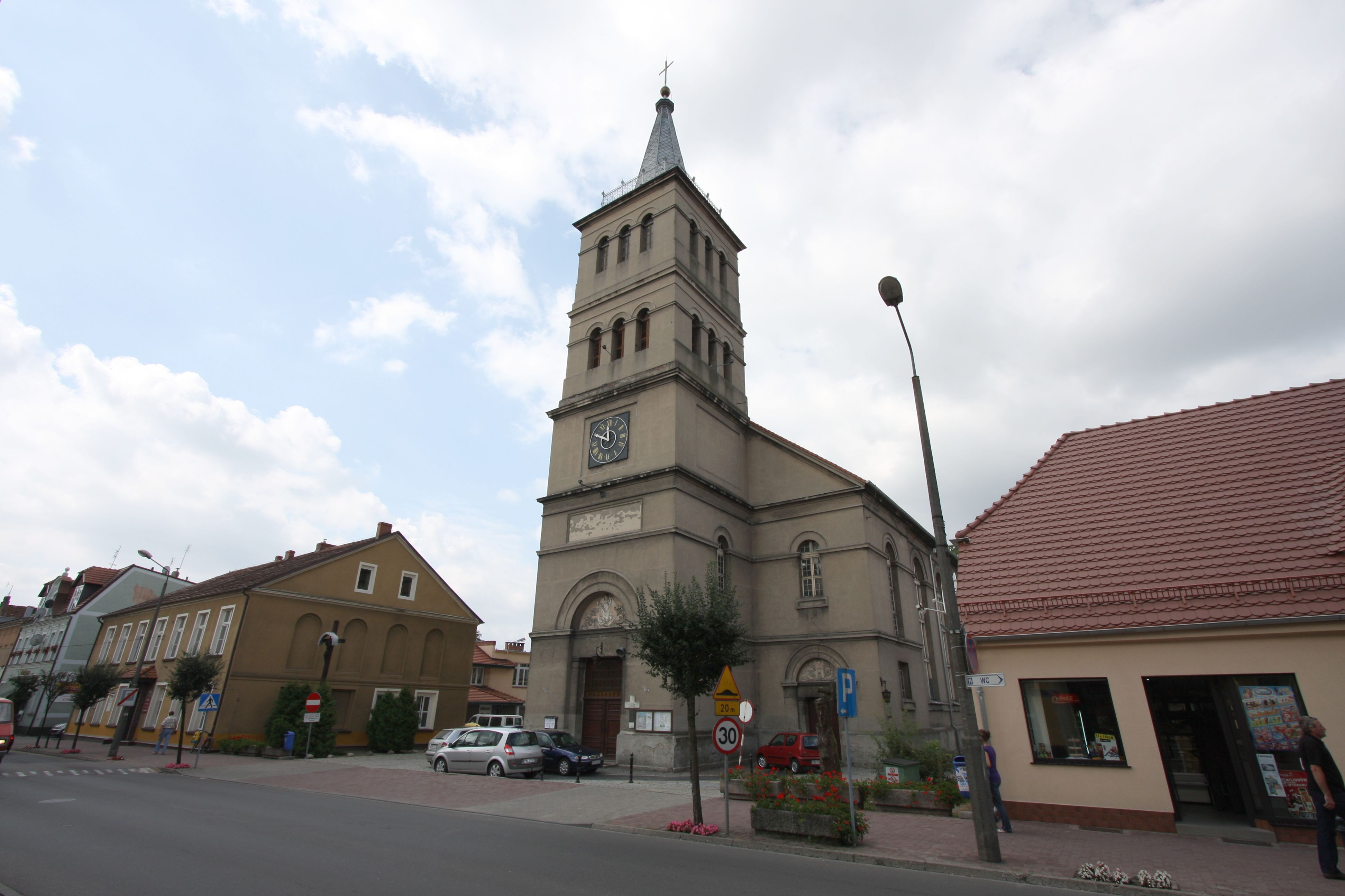 Wolsztyn, kościół ewangelicki, ob. rzym.-kat. fil. p.w. Wniebowstąpienia Pańskiego, mur., 1832